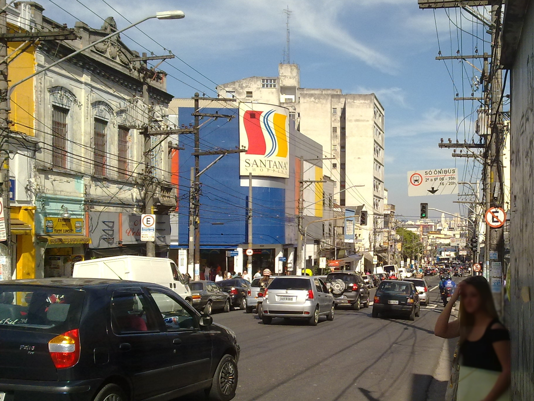 Foto da rua Voluntários da Pátria, centro comercial do bairro de Santana, zona norte da cidade de São Paulo, Brasil